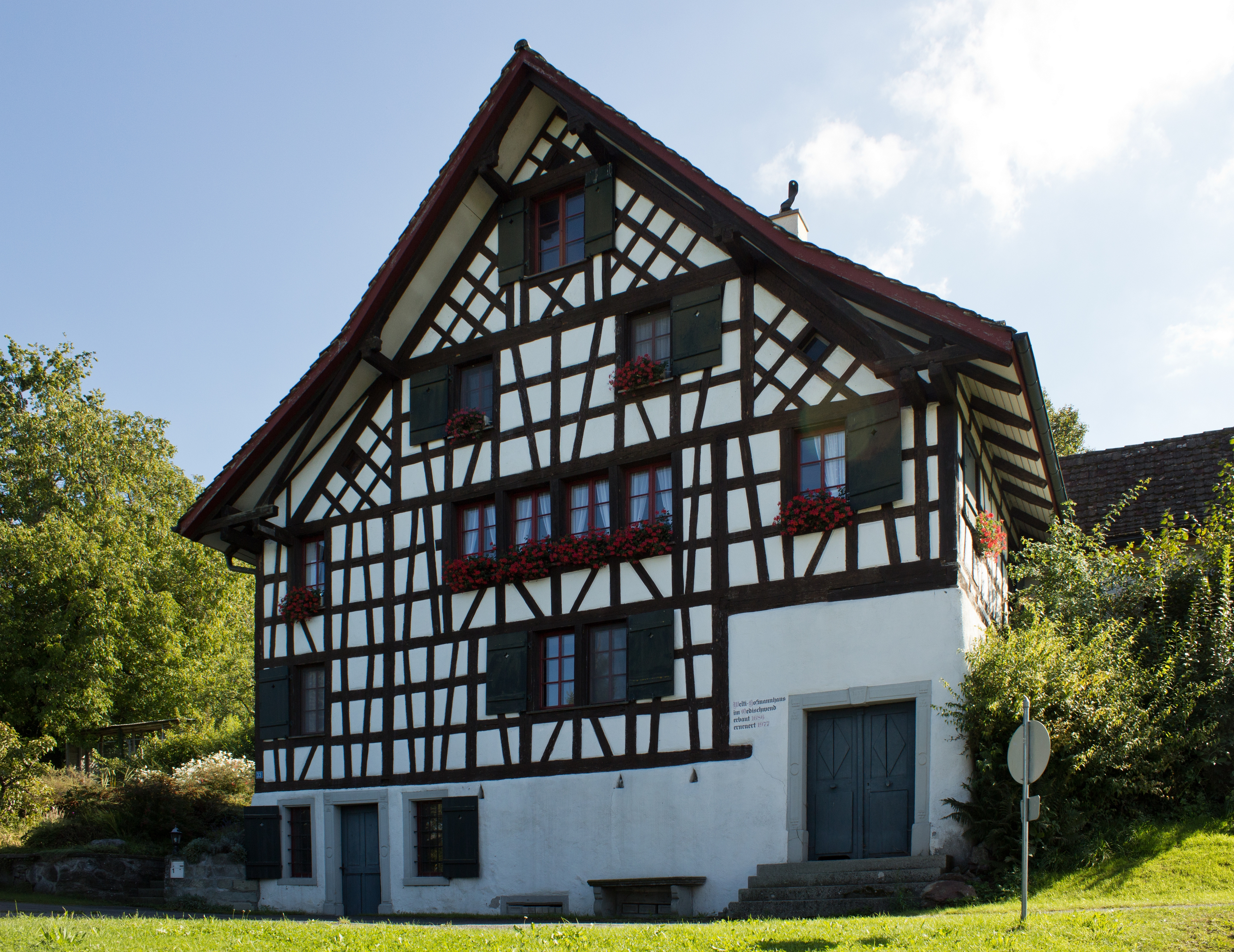 Welti-Hofmann-Haus im oberen Ödischwend